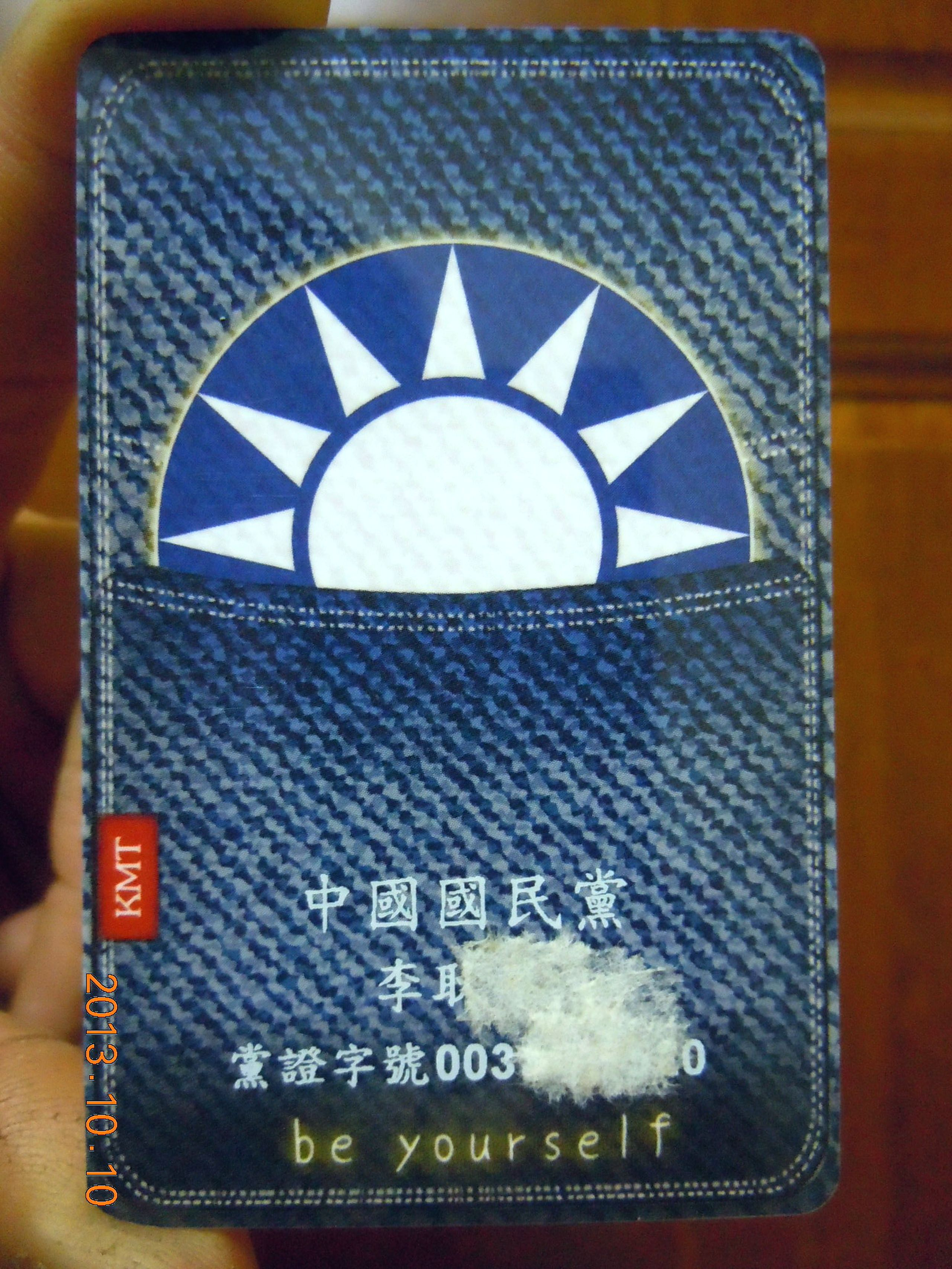 中國國民黨黨證卡的模樣（Free Card）。